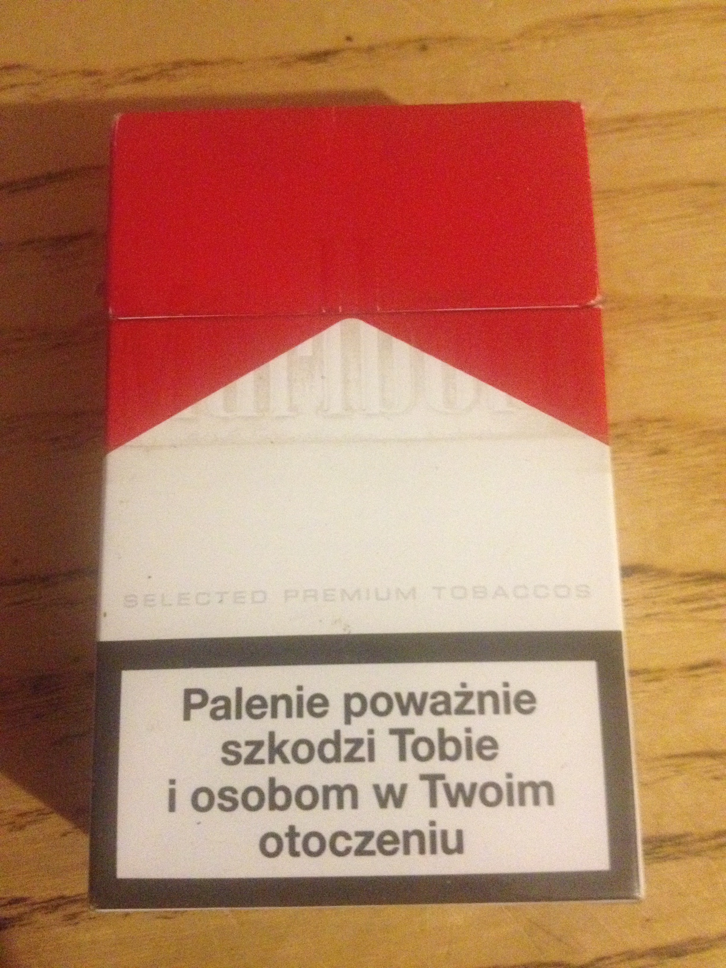 Marlboro Red 20